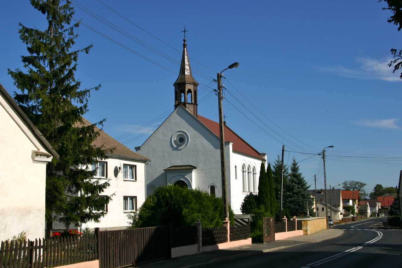 Stare Kotkowice - kaplica p.w. św. Barbary, obecnie kościół filialny, XVIII w. (zabytek nr 557/59 z 24.02.1959)